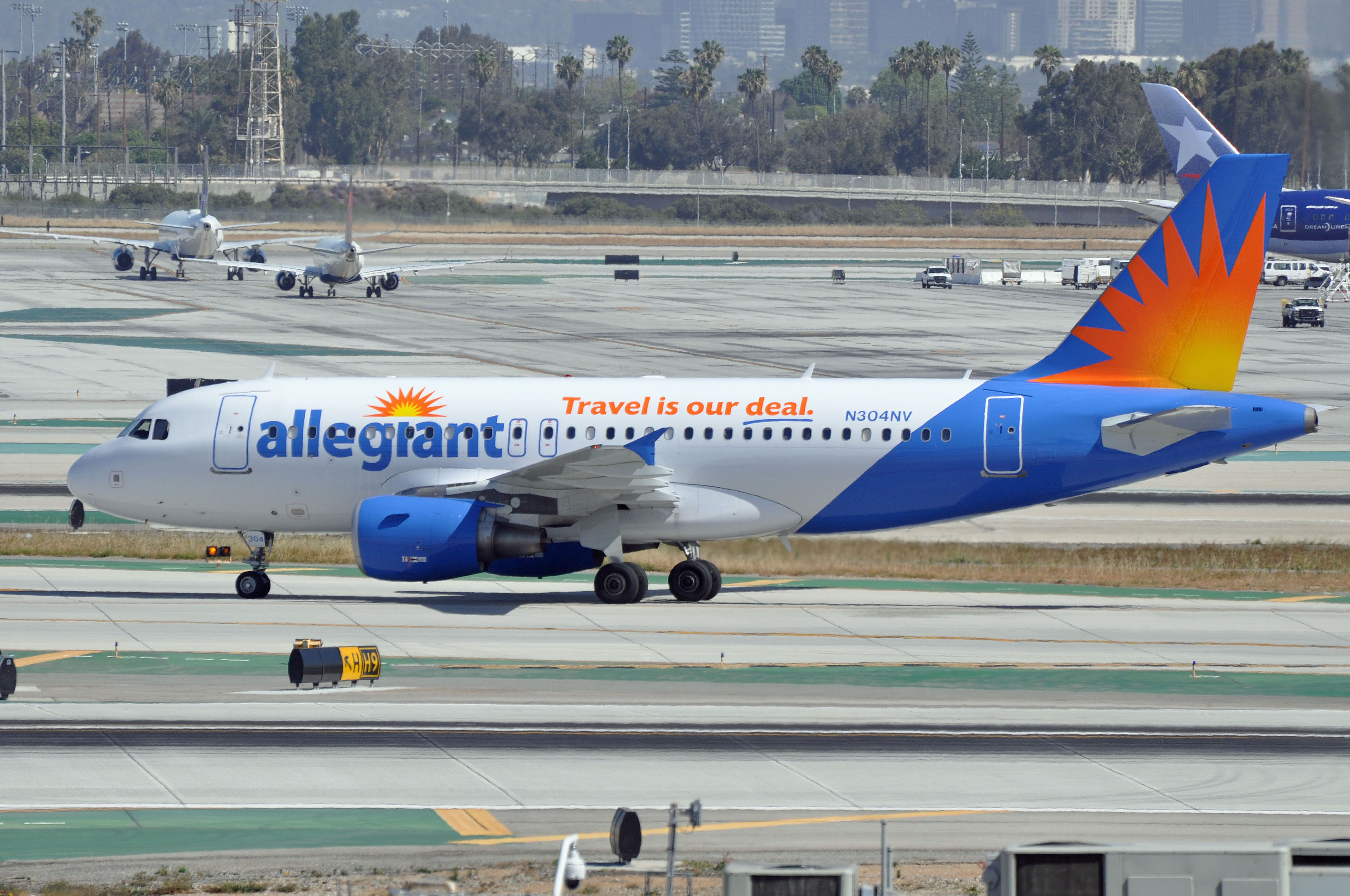 MSN 2265 A319-112 ALLEGIANT AIR LAX AIRPORT EX EASYJET AS G-EZES / EASYJET SWITZERLAND AS HB-JZJ